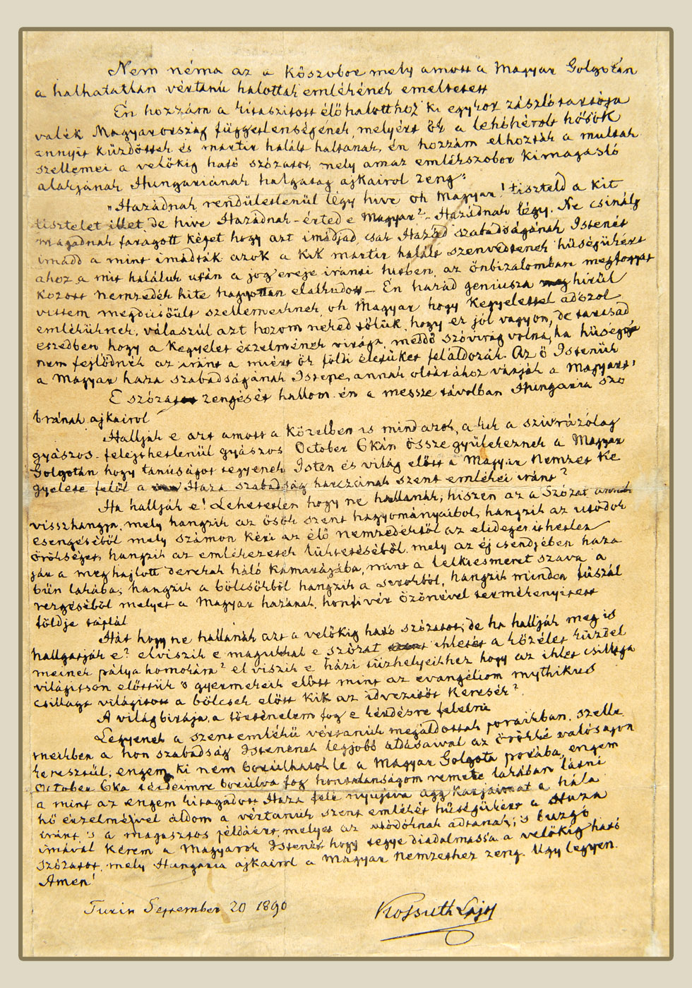 Kossuth saját kézzel írt beszéde az aradi emlékmű avatására